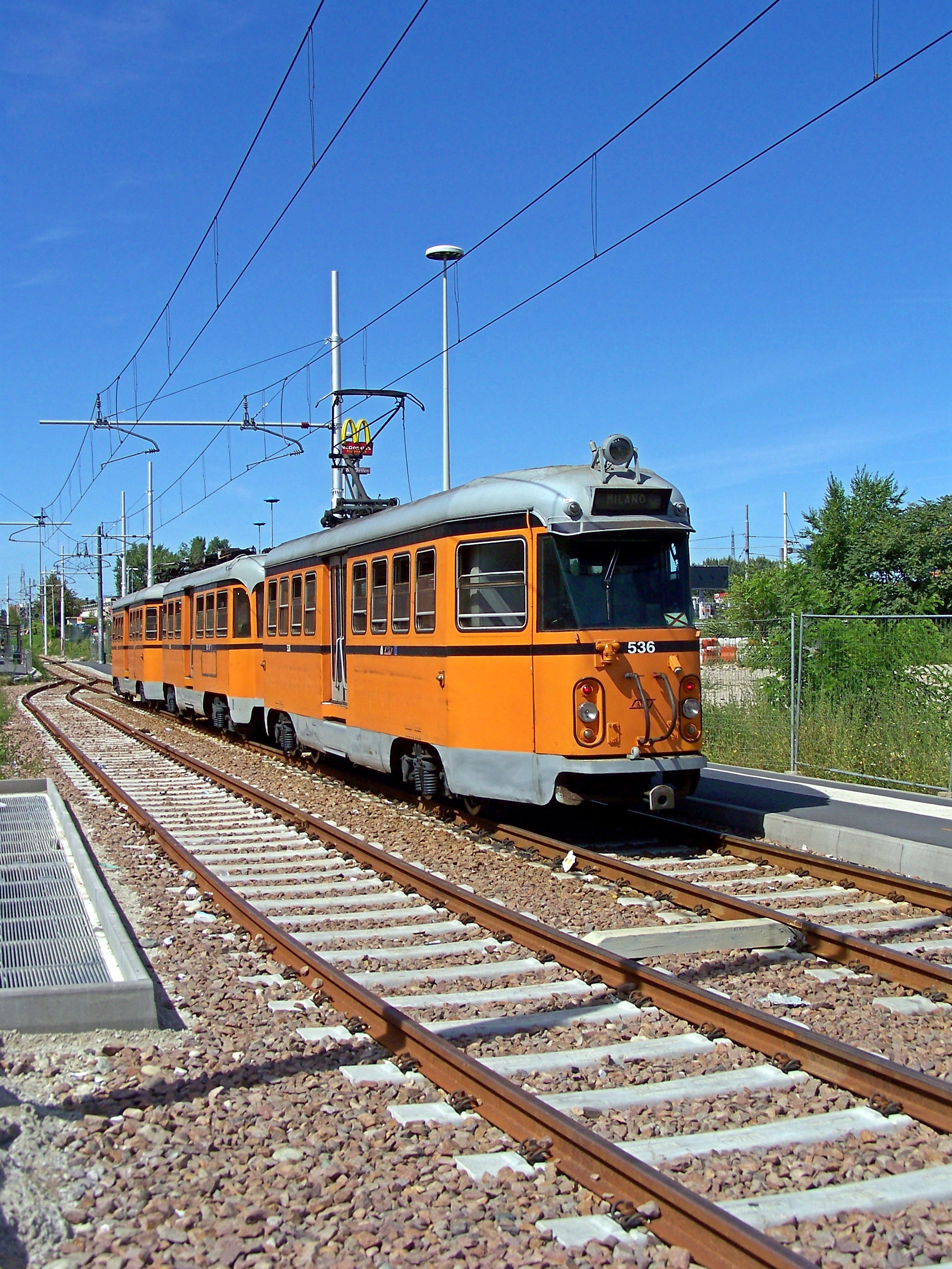 Il Bloccato 535+503+536 in sosta presso il capolinea di Comasina M3 della tranvia Milano–Limbiate.